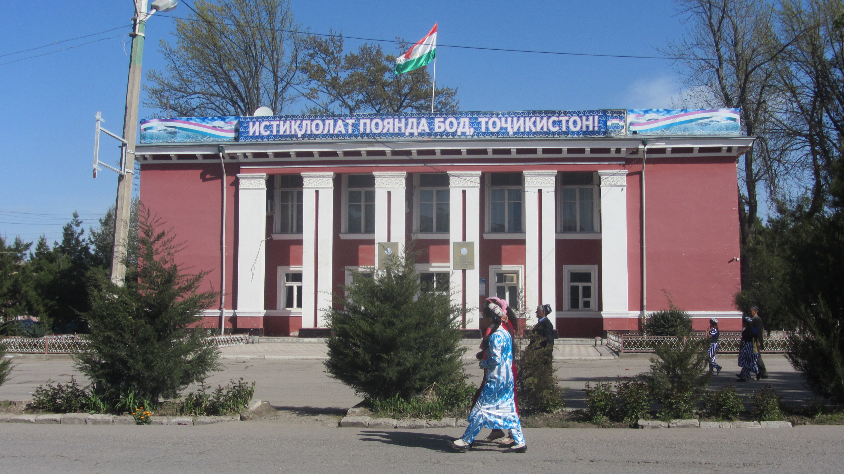 Тоҷикӣ: Ноҳияи Абдураҳмон Ҷомӣ